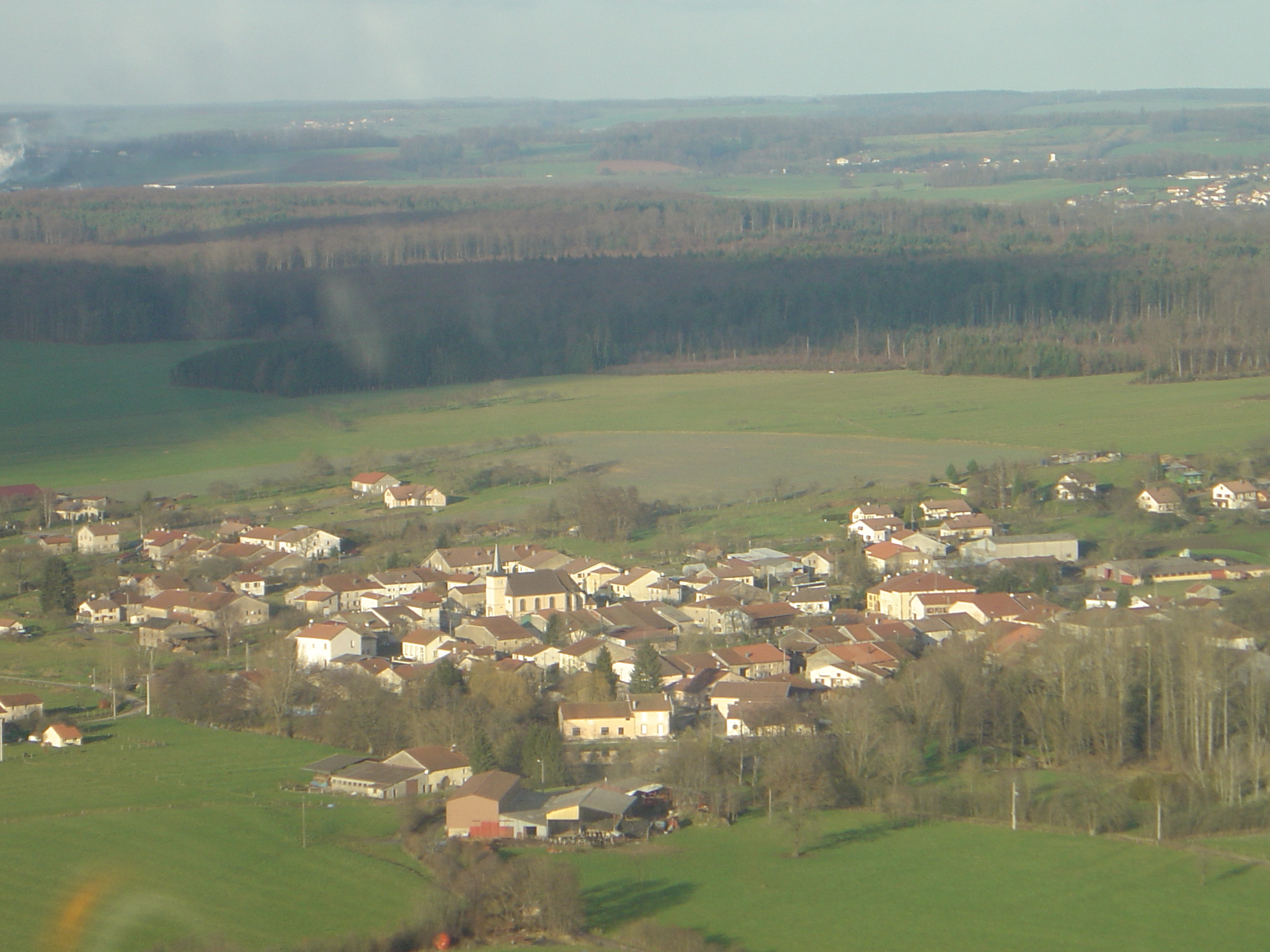 Vue aérienne de Sainte-Hélène (Vosges) réalisée le 14 janvier 2007 par Sébastien Beaujard